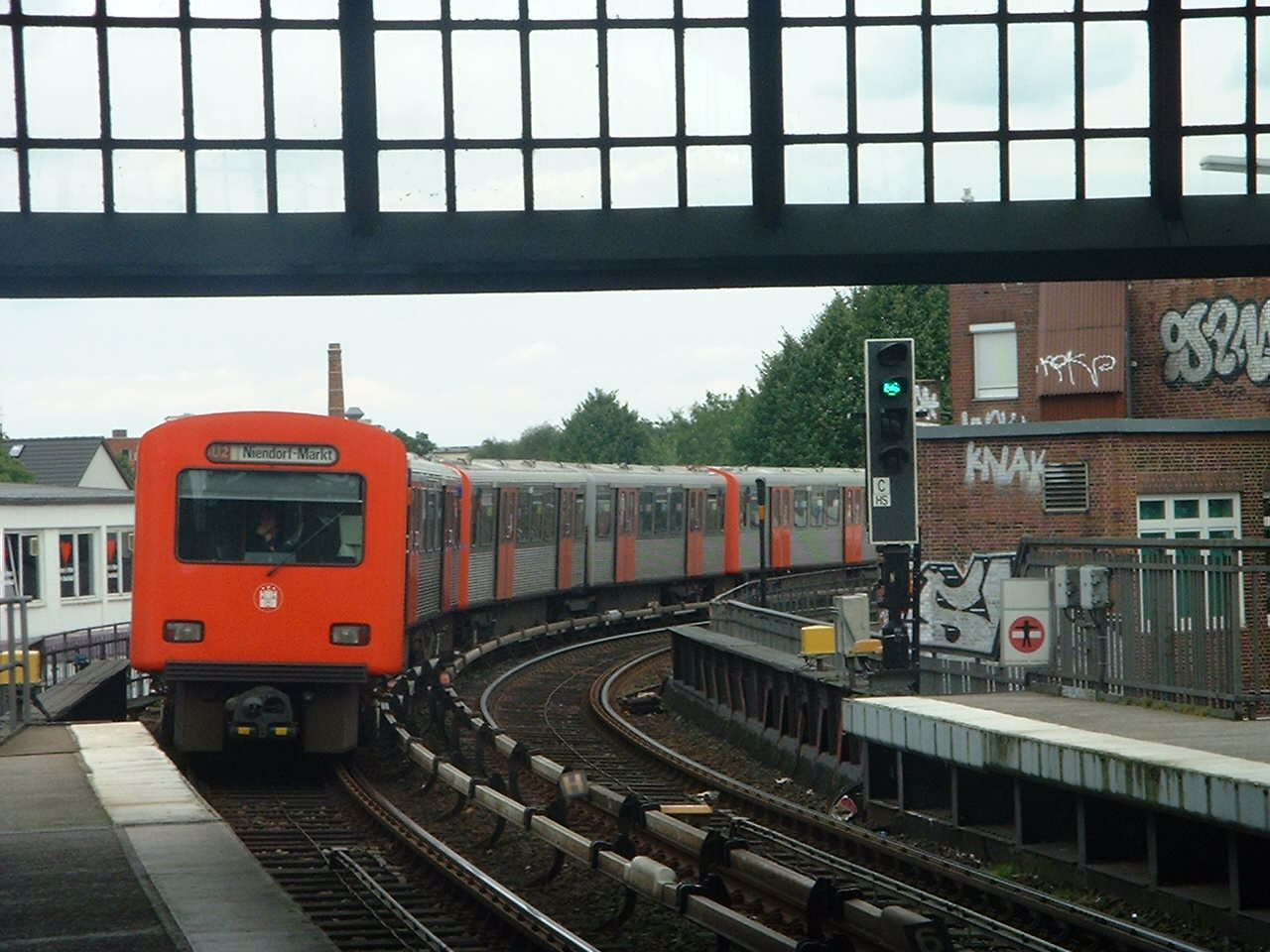 Hamburger U-Bahnwagen des Typs DT2 bei der Einfahrt von Norden aus in den Bahnhof Hamburger Straße.